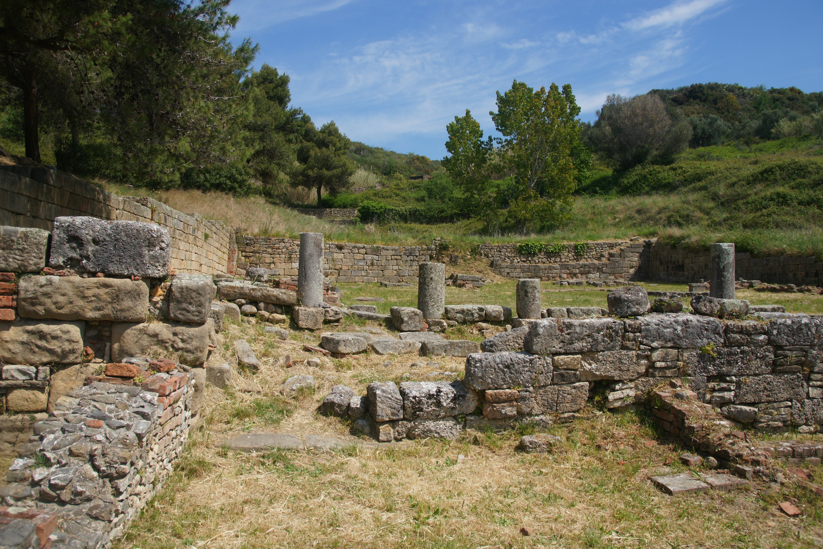 Elea - Velia: Asklepiosheiligtum